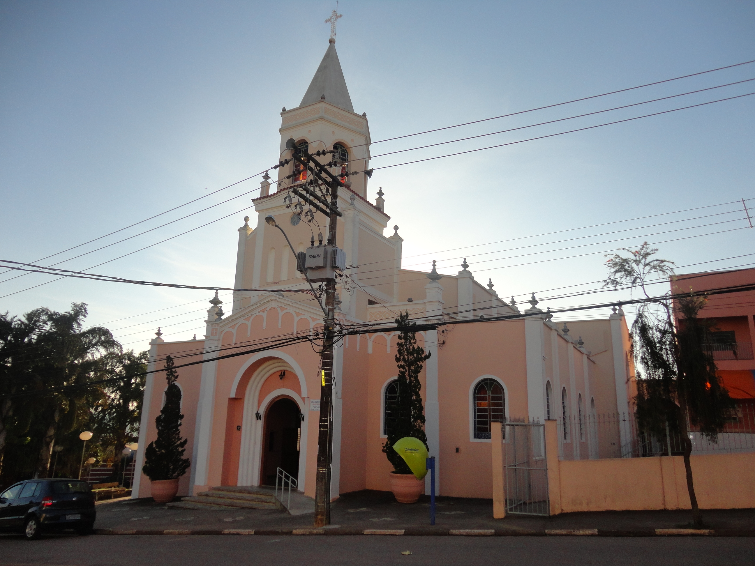 Igreja Santo Antônio em Itatiba